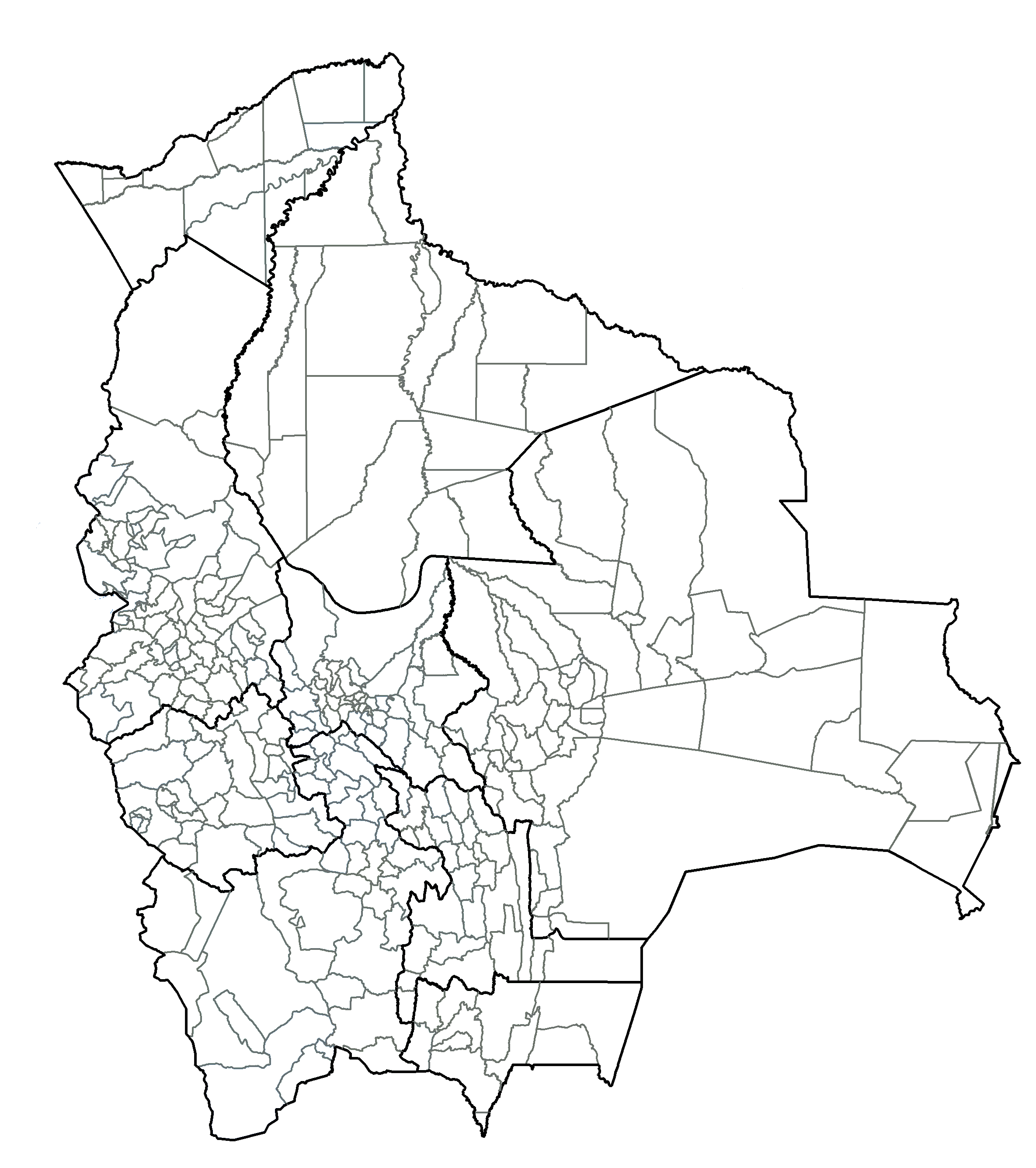 Division Territorial de Bolivia en Departamentos y Municipios